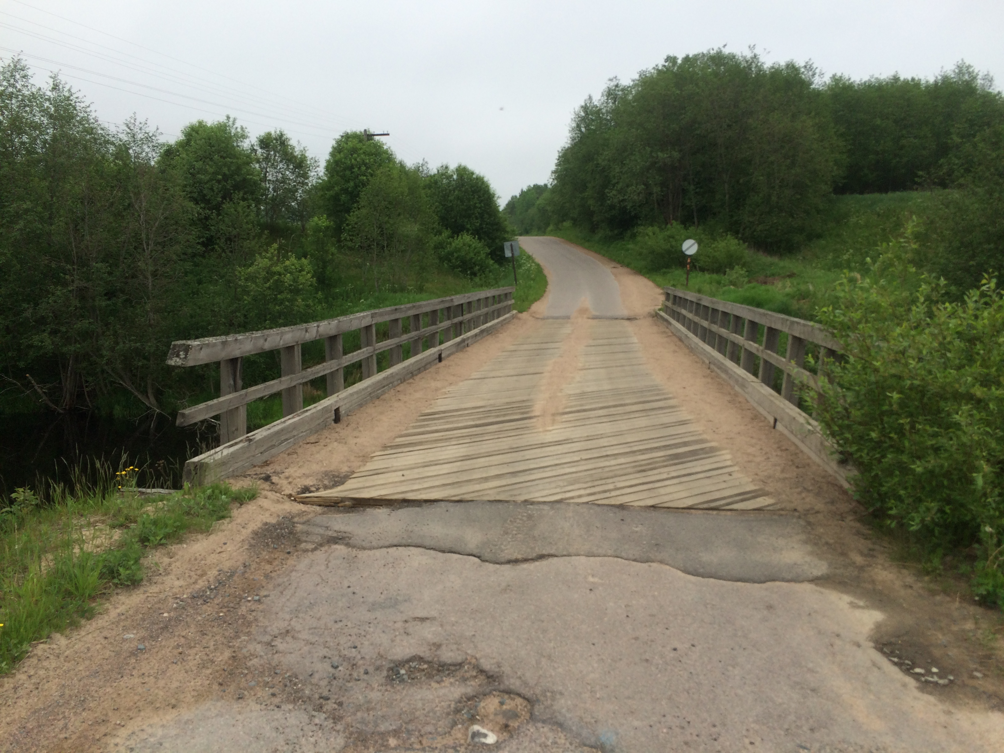 Новзема